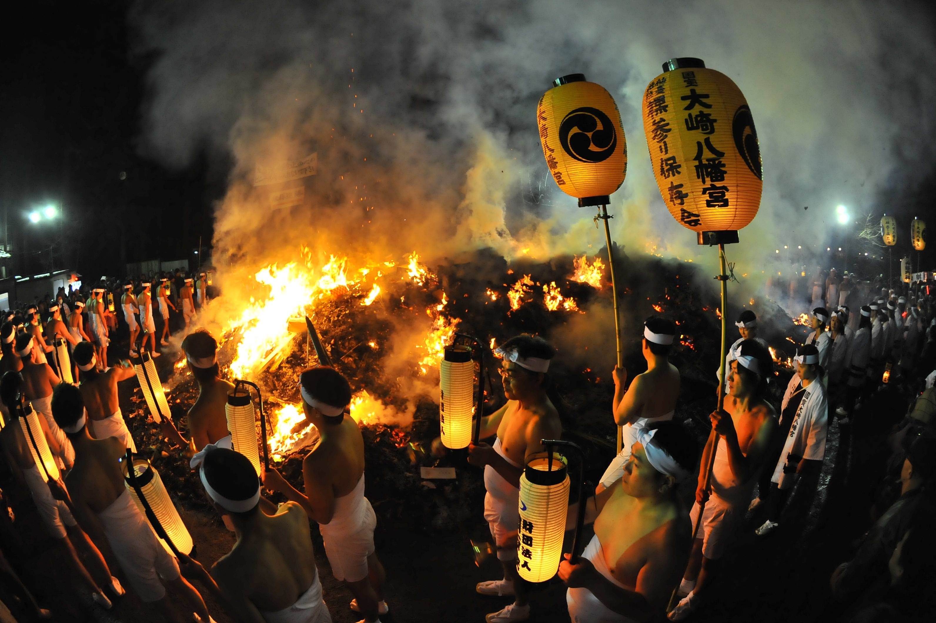 仙台裸参りが大崎八幡宮のご神火の周囲を廻っている。